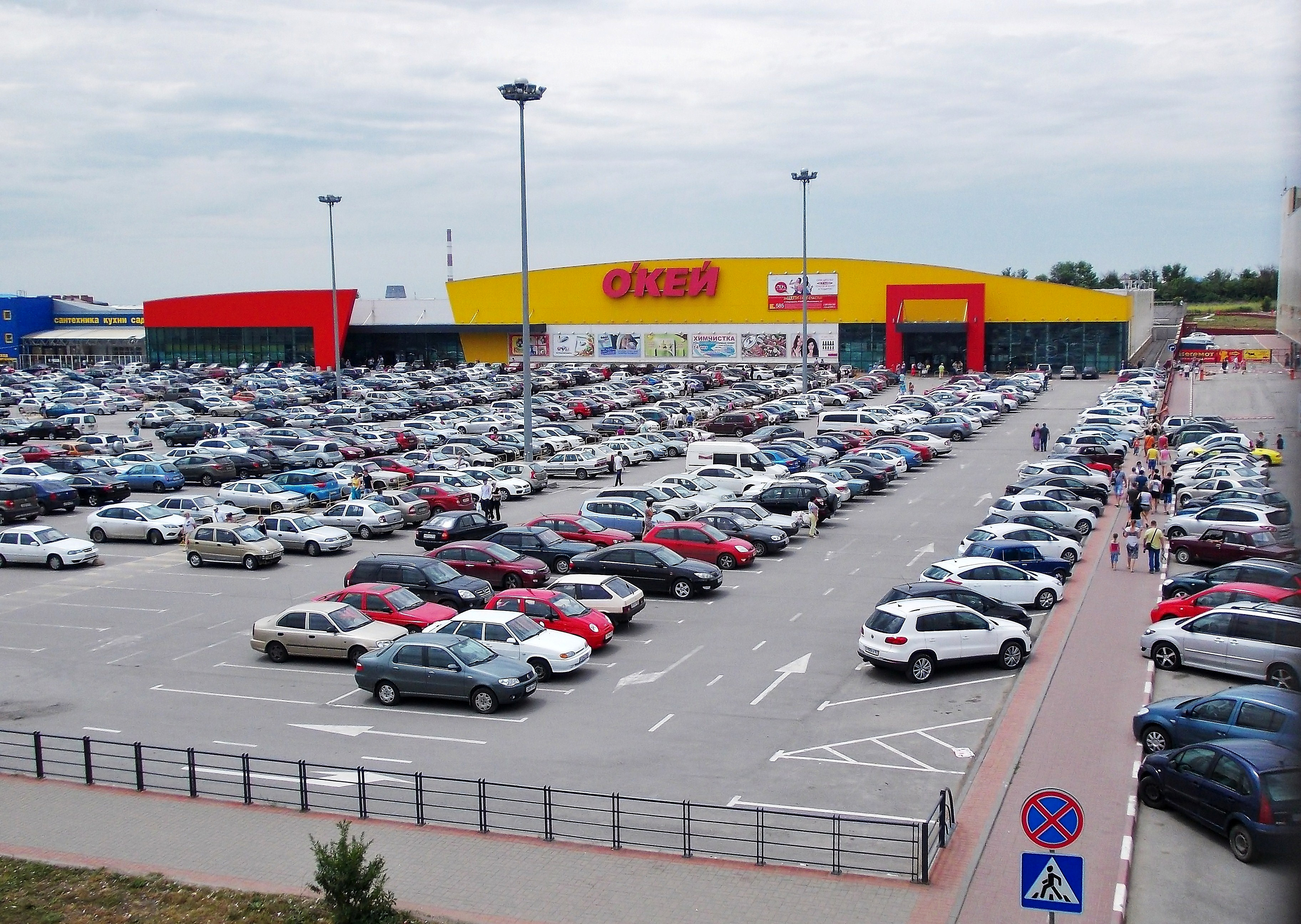 Гипермаркет «Окей»